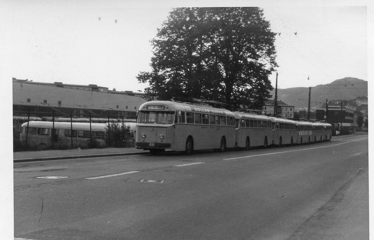 Trolleybuss i Bergen med reklame for Dollar kaffe